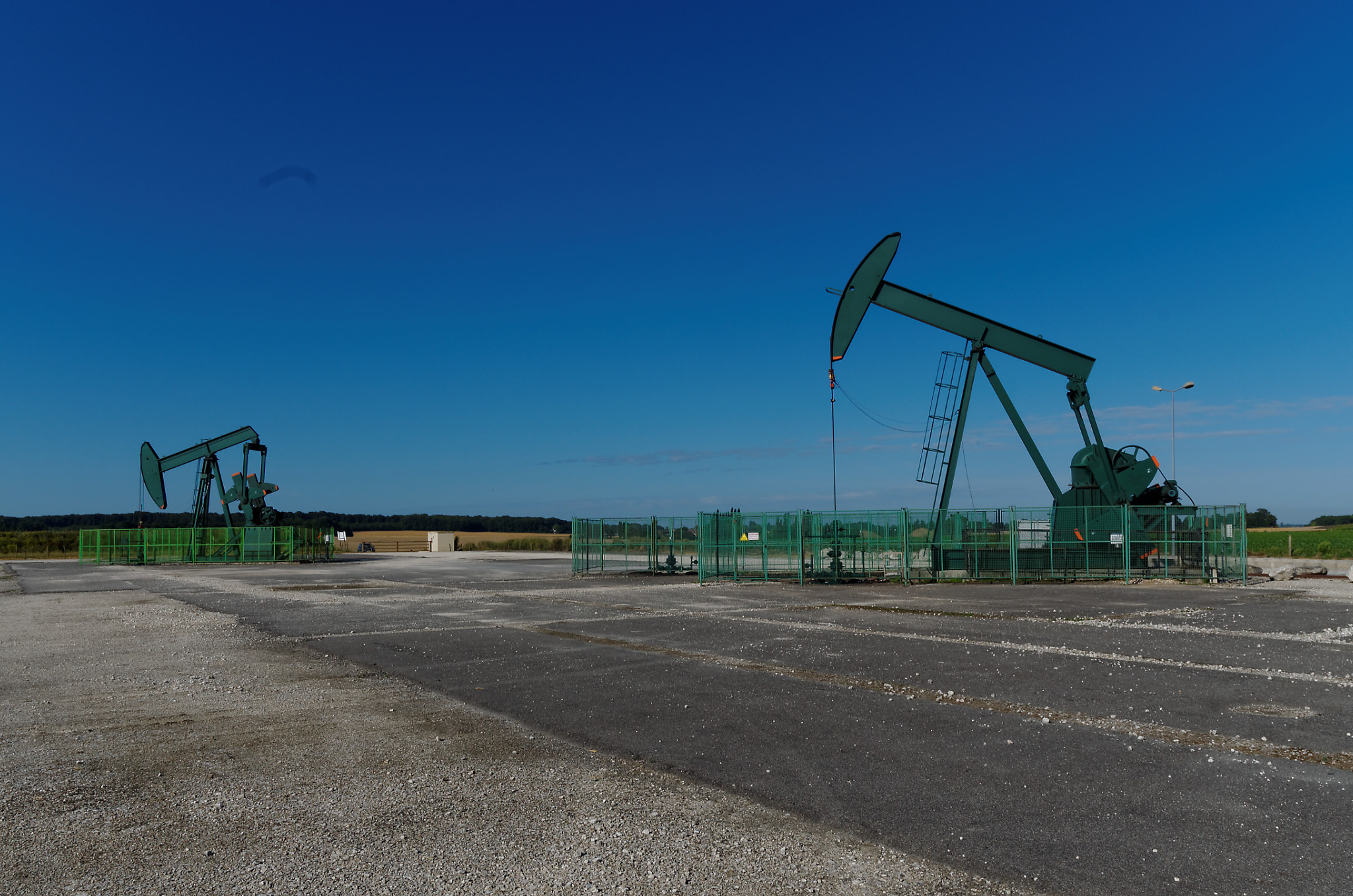 Chevalets de pompage (pumpjack) - Puit de pétrole à Jouy-le-Châtel